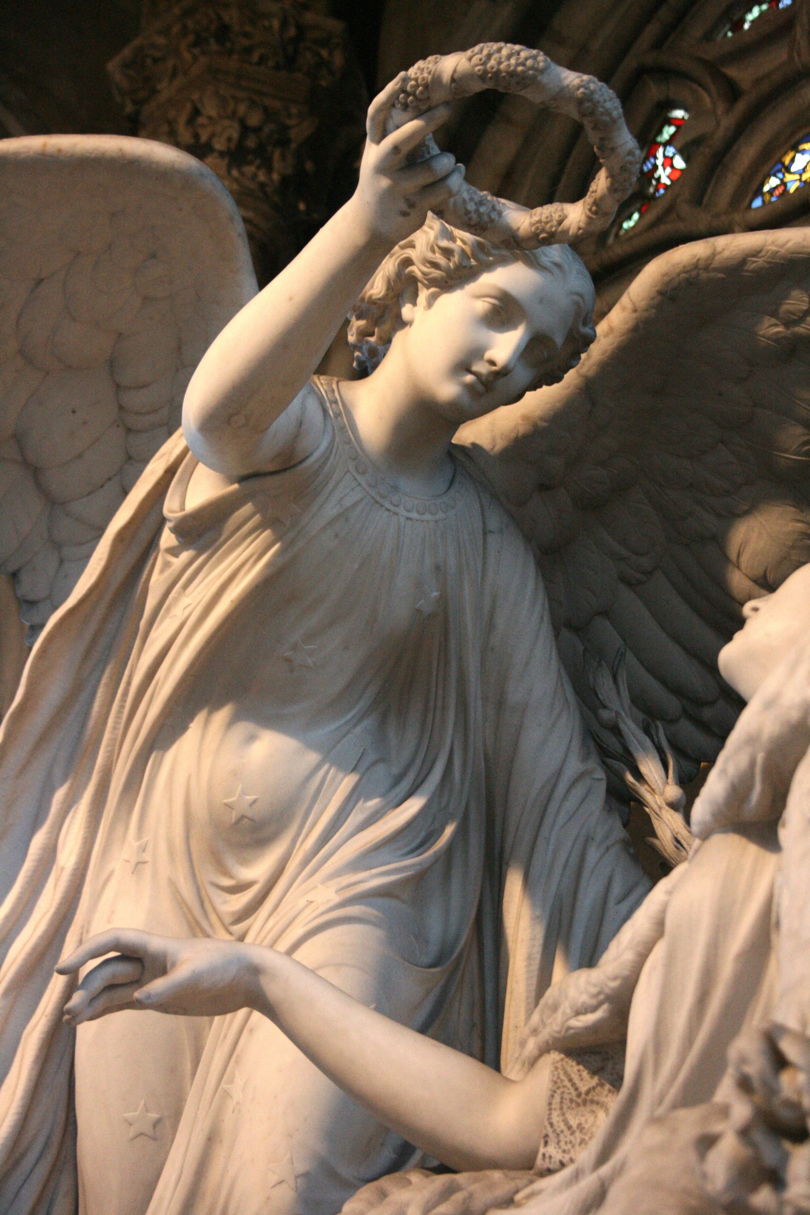 Sint-Petrus-en-Pauluskerk in Oostende (België). Neogotische kapel met praalgraf van koningin Louise-Marie. Monument van Carraramarmer. Werk van beeldhouwer Charles Auguste Fraikin (1817-1893) (detail)